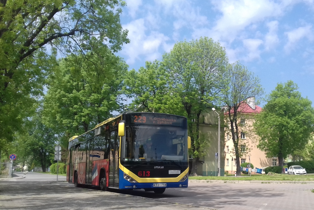 Otokar Kent C #613 MPK Tarnów